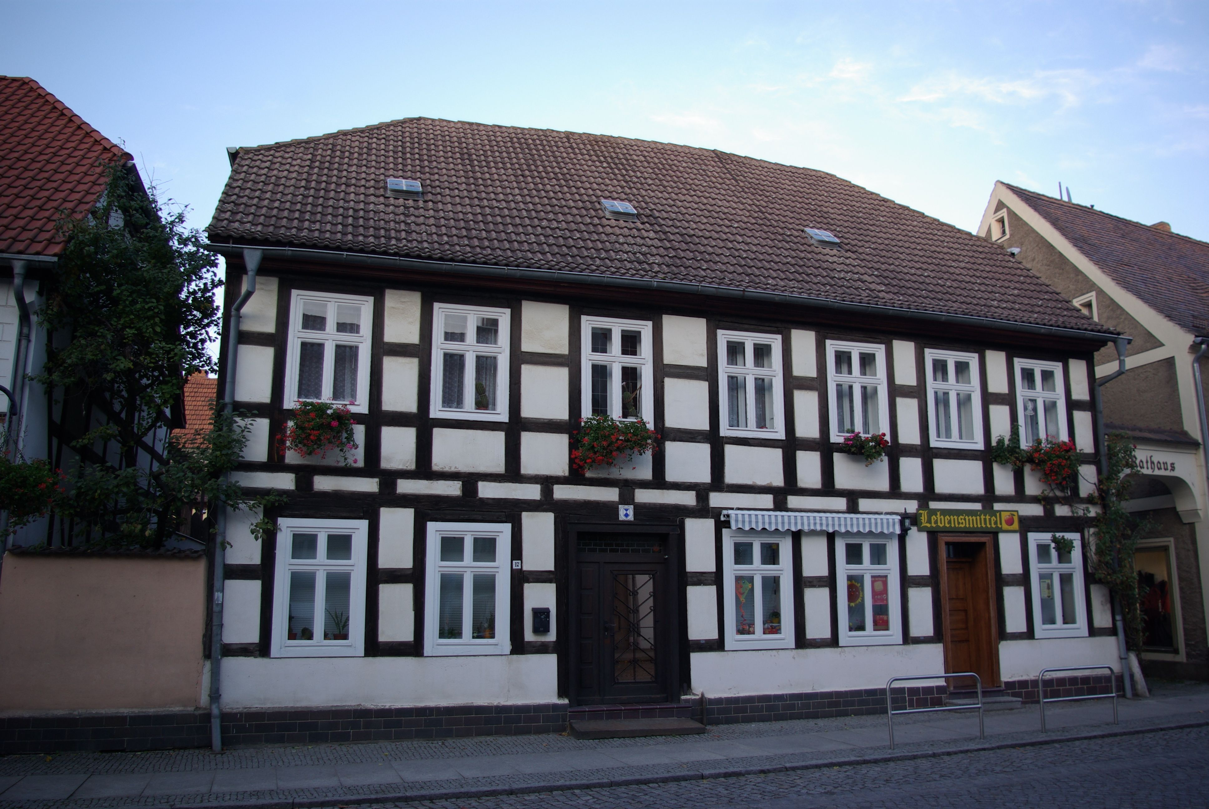 Lübbenau in Brandenburg. Das Haus in der Elm-Welk-Straße 17 steht unter Denkmalschutz.